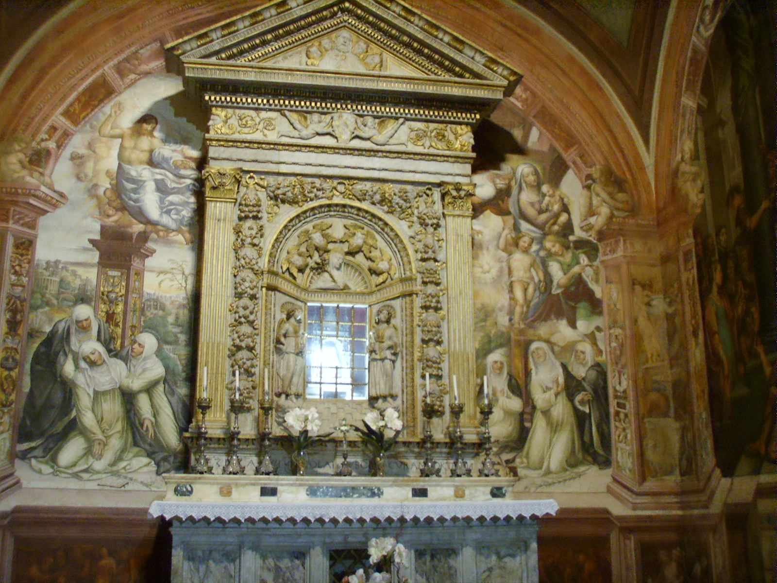 Siena, san domenico, cappella di Santa Caterina, altare di Giovanni di Stefano, affreschi del Sodoma Svenimento ed Estasi della Santa